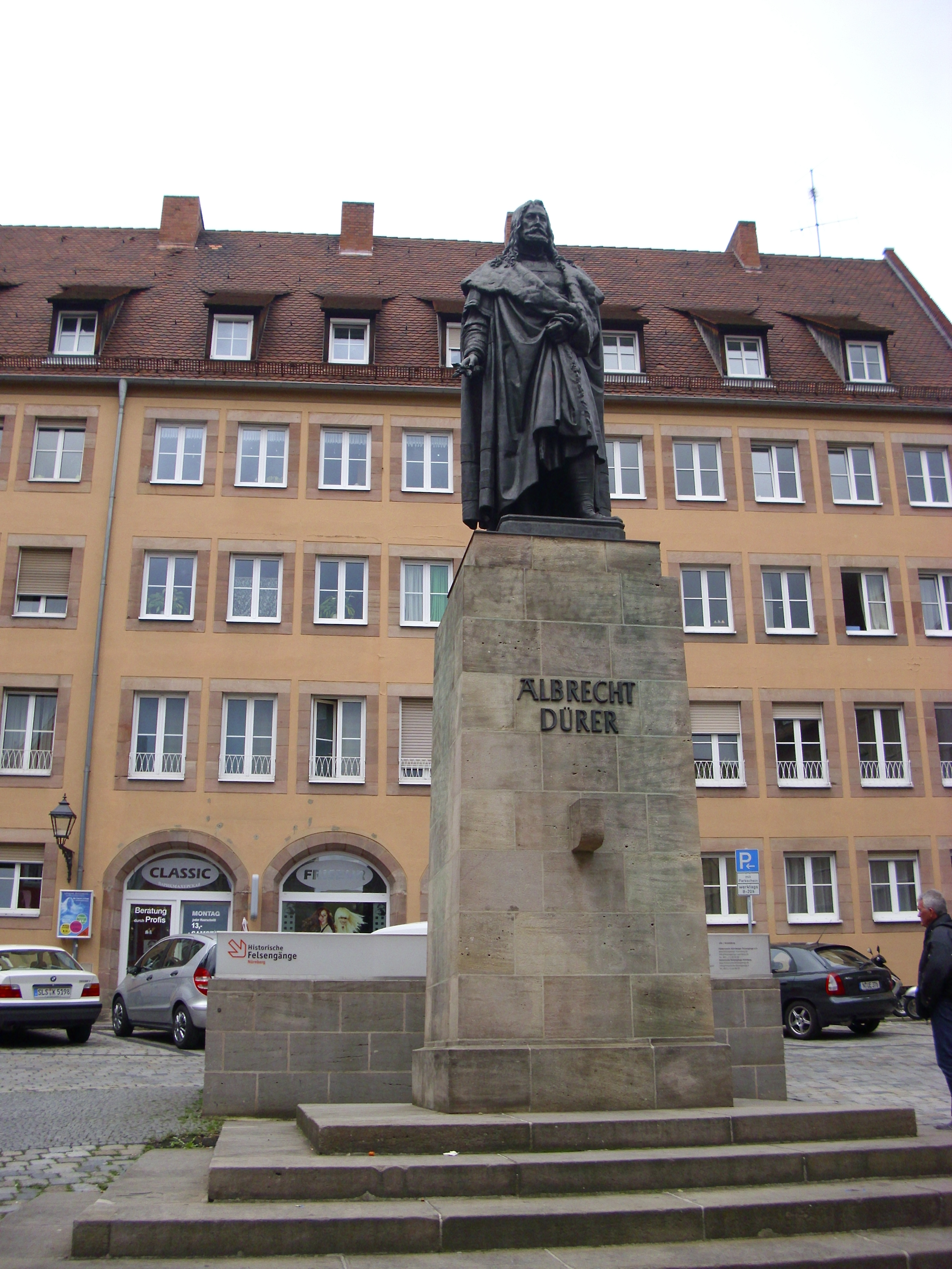 Dürerstandbild Sebalder Altstadt 02